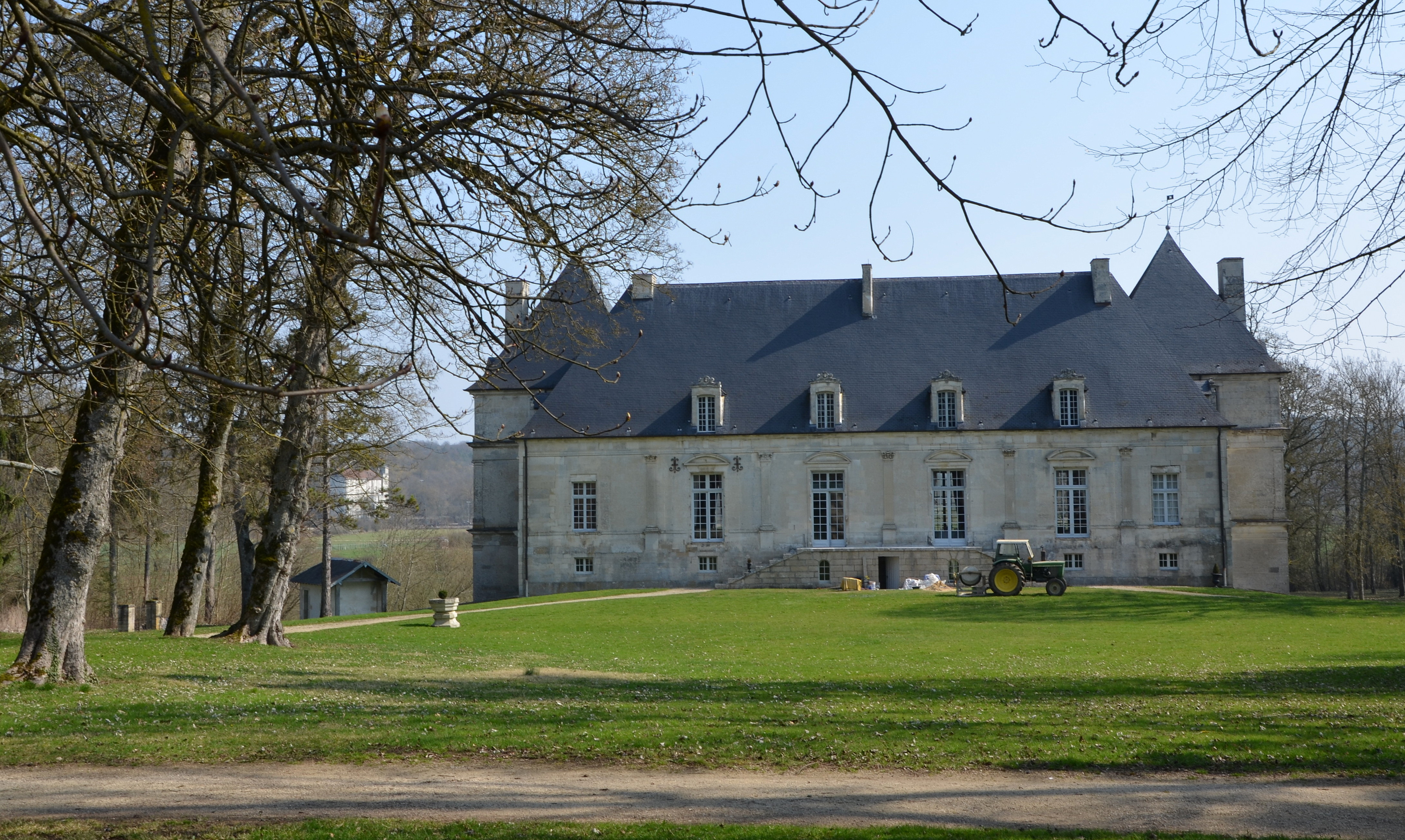 Chateau de Nuits, Yonne, Bourgogne, France